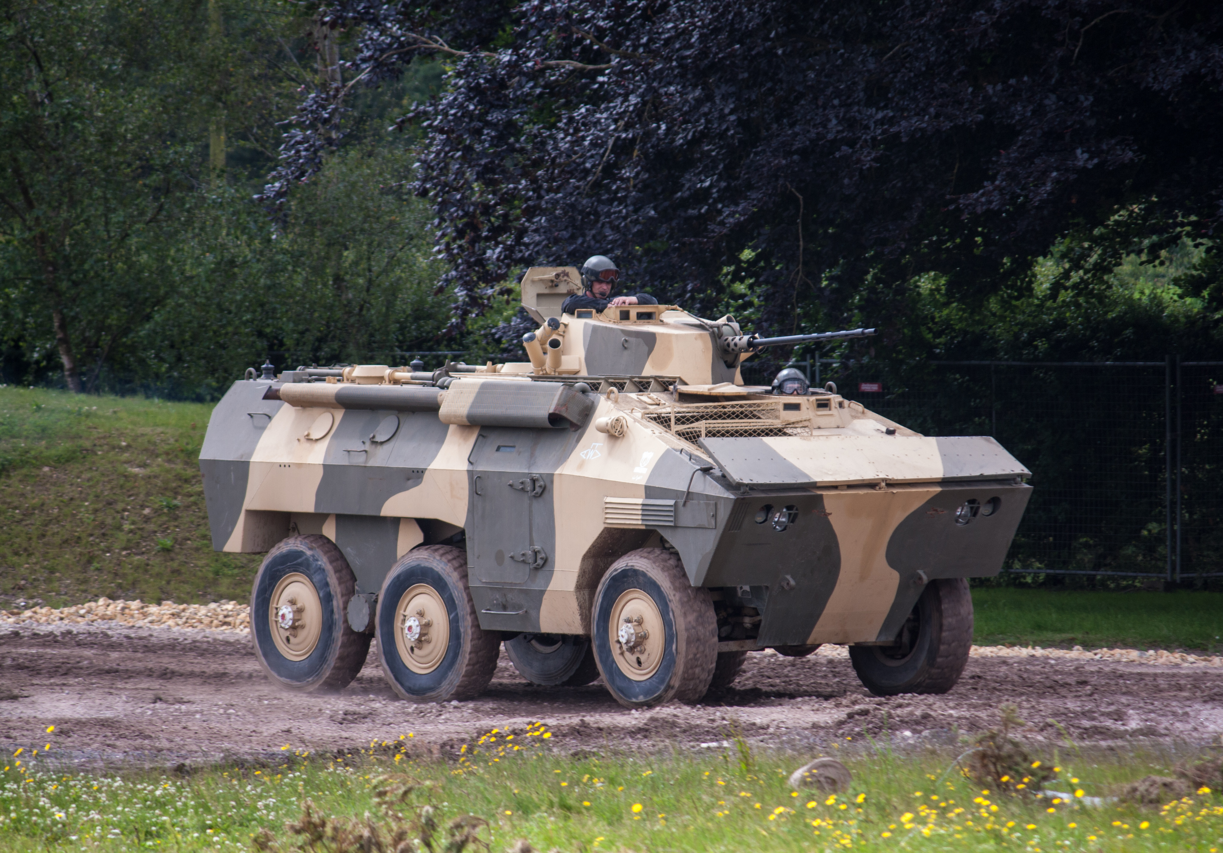 Urutu APC